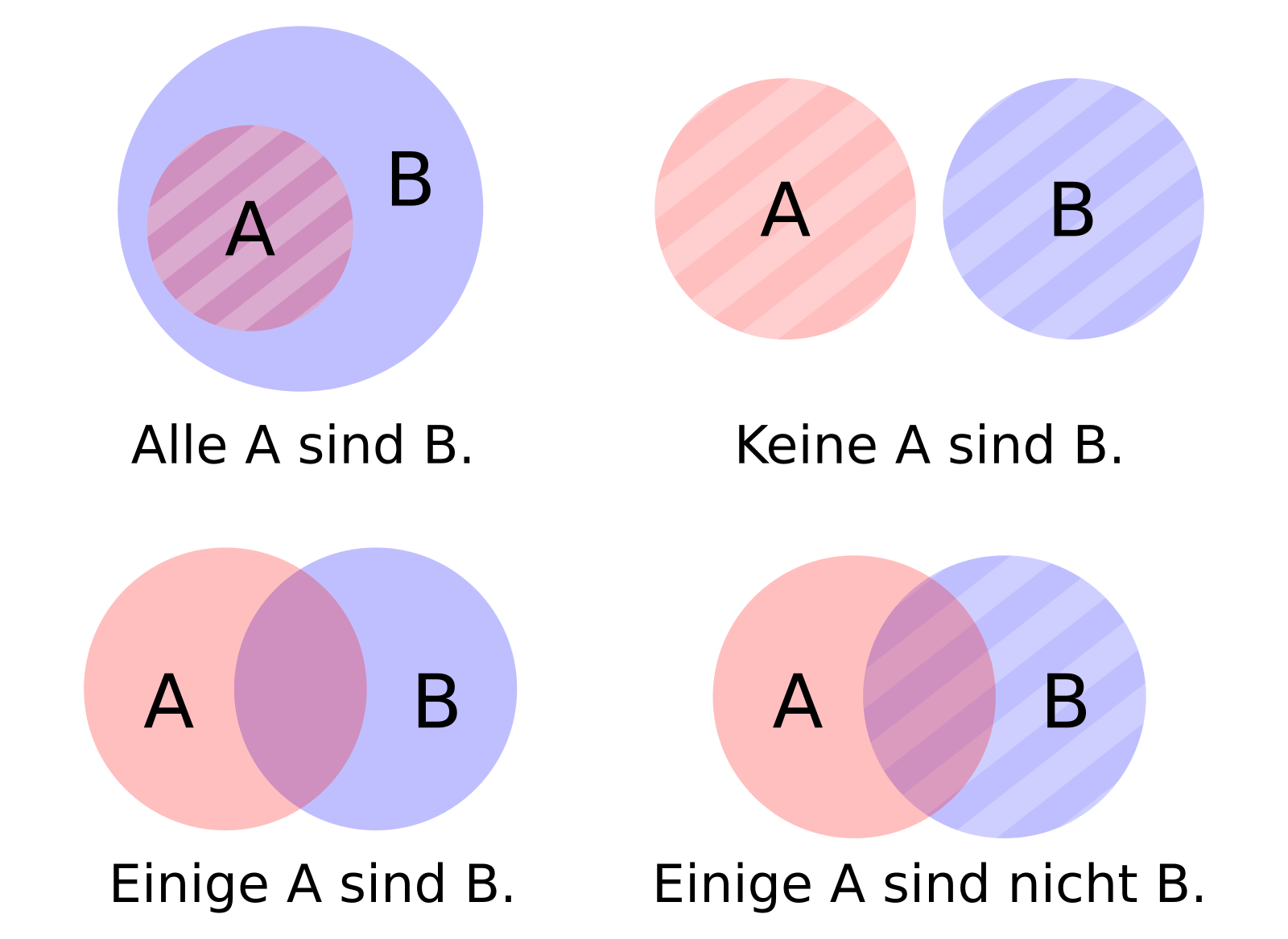 In allgemein bejahenden („Alle A sind B“) Propositionen ist das Subjekt (A) distribuiert. In allgemein verneinenden („Keine A sind B“) Propositionen ist das Subjekt (A) und das Prädikat (B) distribuiert. In partikular bejahenden („Einige A sind B“) Propositionen sind weder Subjekt noch Prädikat distribuiert. In partikular verneinenden („Einige A sind nicht B“) Propositionen ist das Prädikat distribuiert.